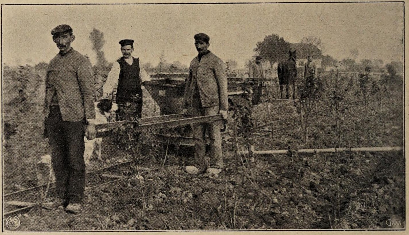 Obstplantage Wilhelm de Joncheere, Cleve am Niederrhein